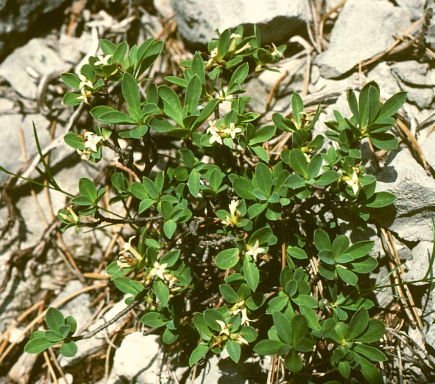 Berg-Seidelbast (Daphne alpina), Spatzenzungengewächse (Thymelaeaceae) - Österreich/Austria/Autriche: Kärnten, Karawanken, Loiblpass, Bergsturz S Unterloibl